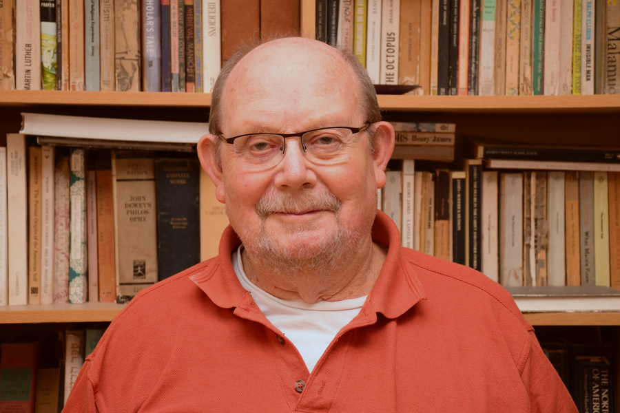 תמונה של אמציה פורת בביתו, ינואר 2020